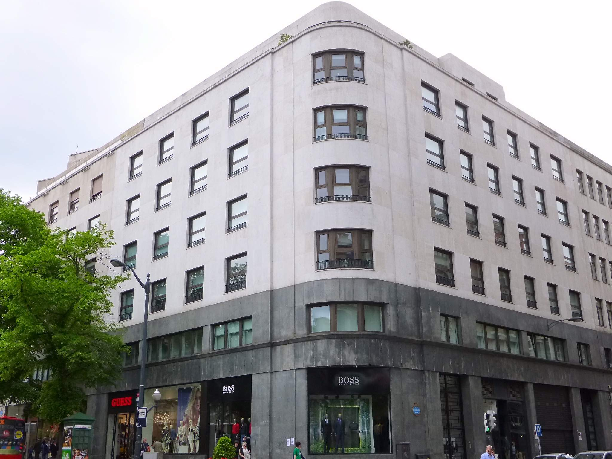 Edificio La Aurora (Bilbao)